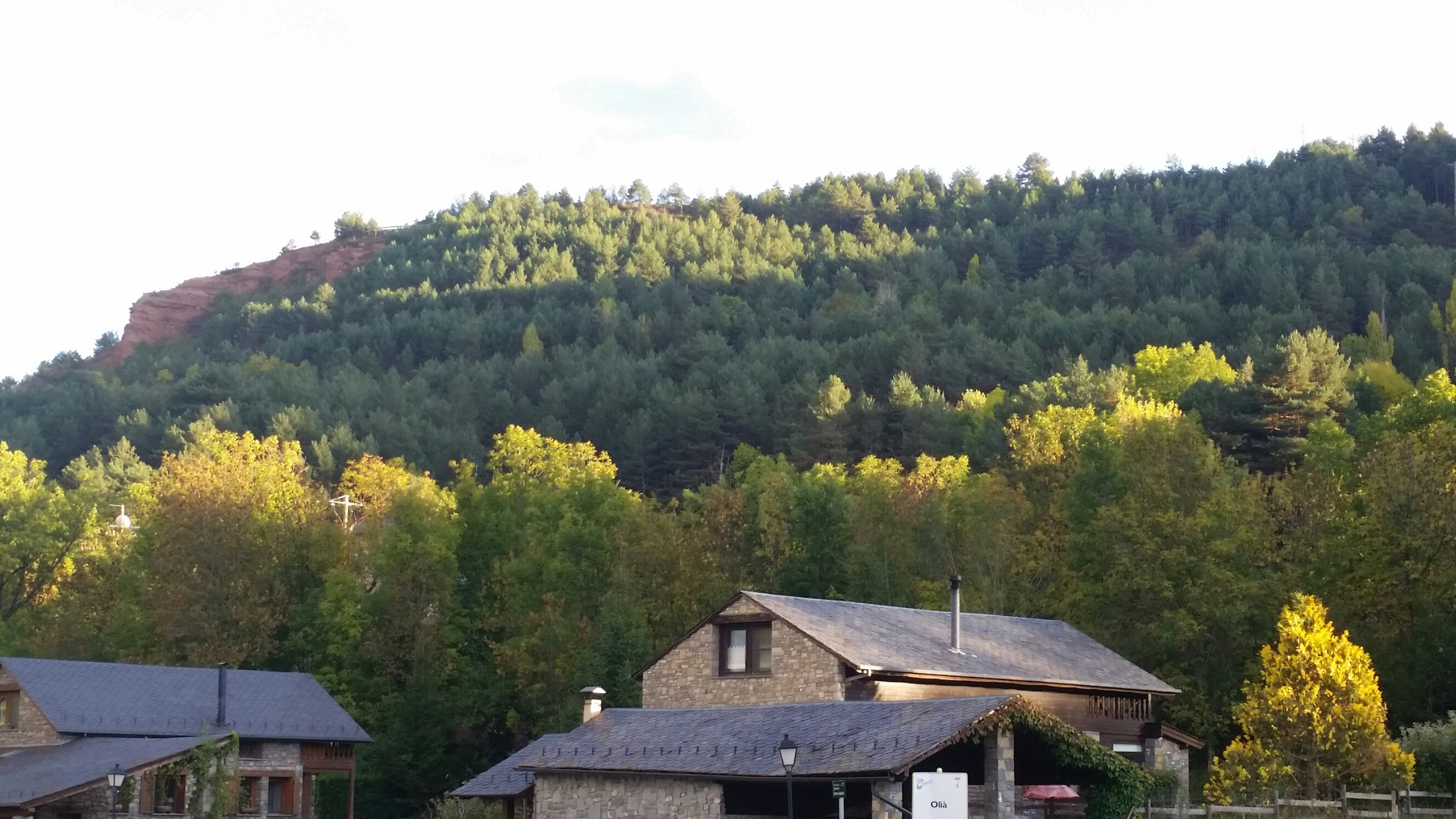 Serrat de Nas. Fotografia feta des d'Olià